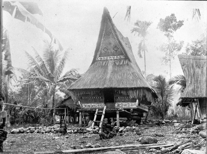 Foto. Een Karo Batak huis